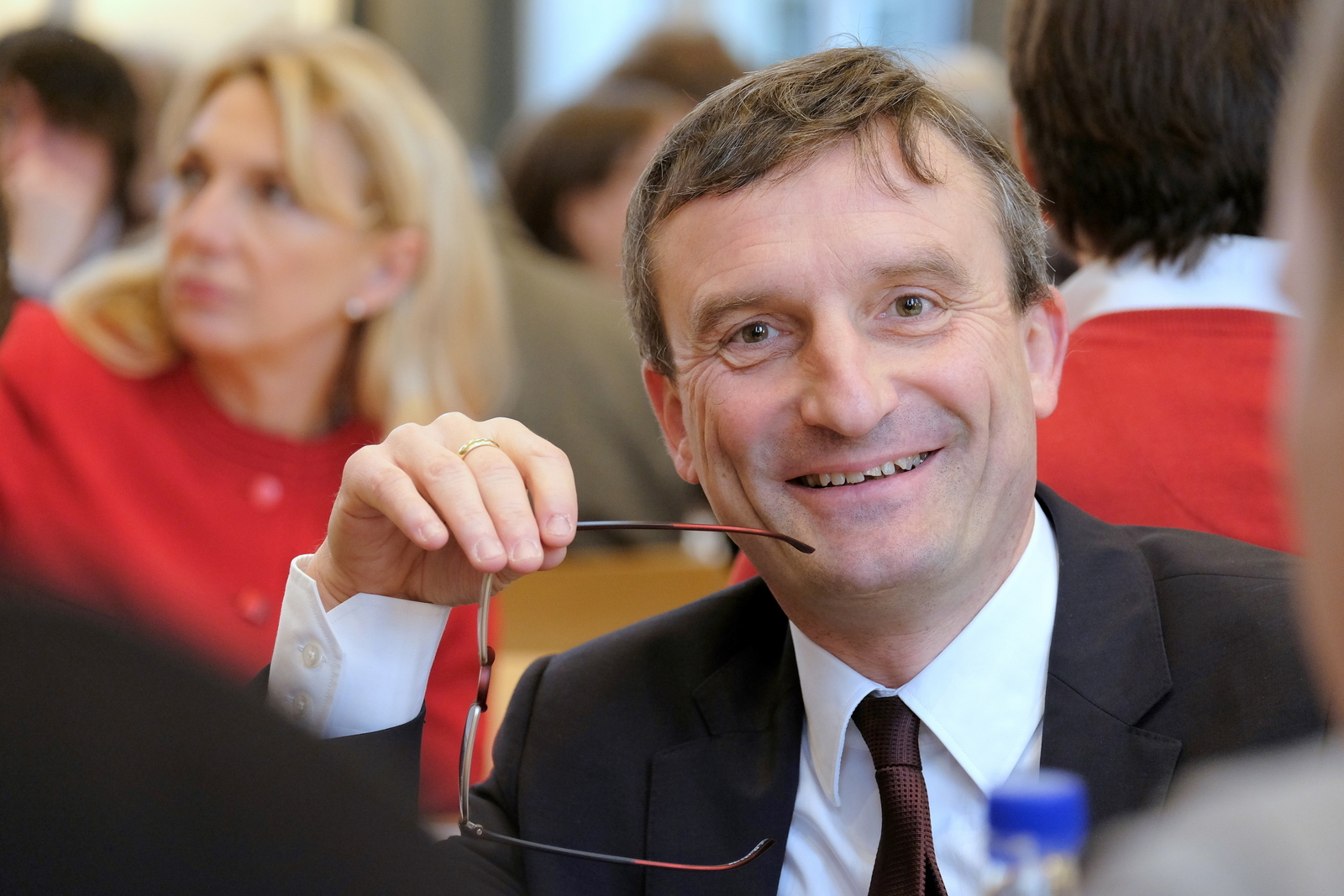 Thomas Geisel SPD Oberbürgermeister der Stadt Düsseldorf